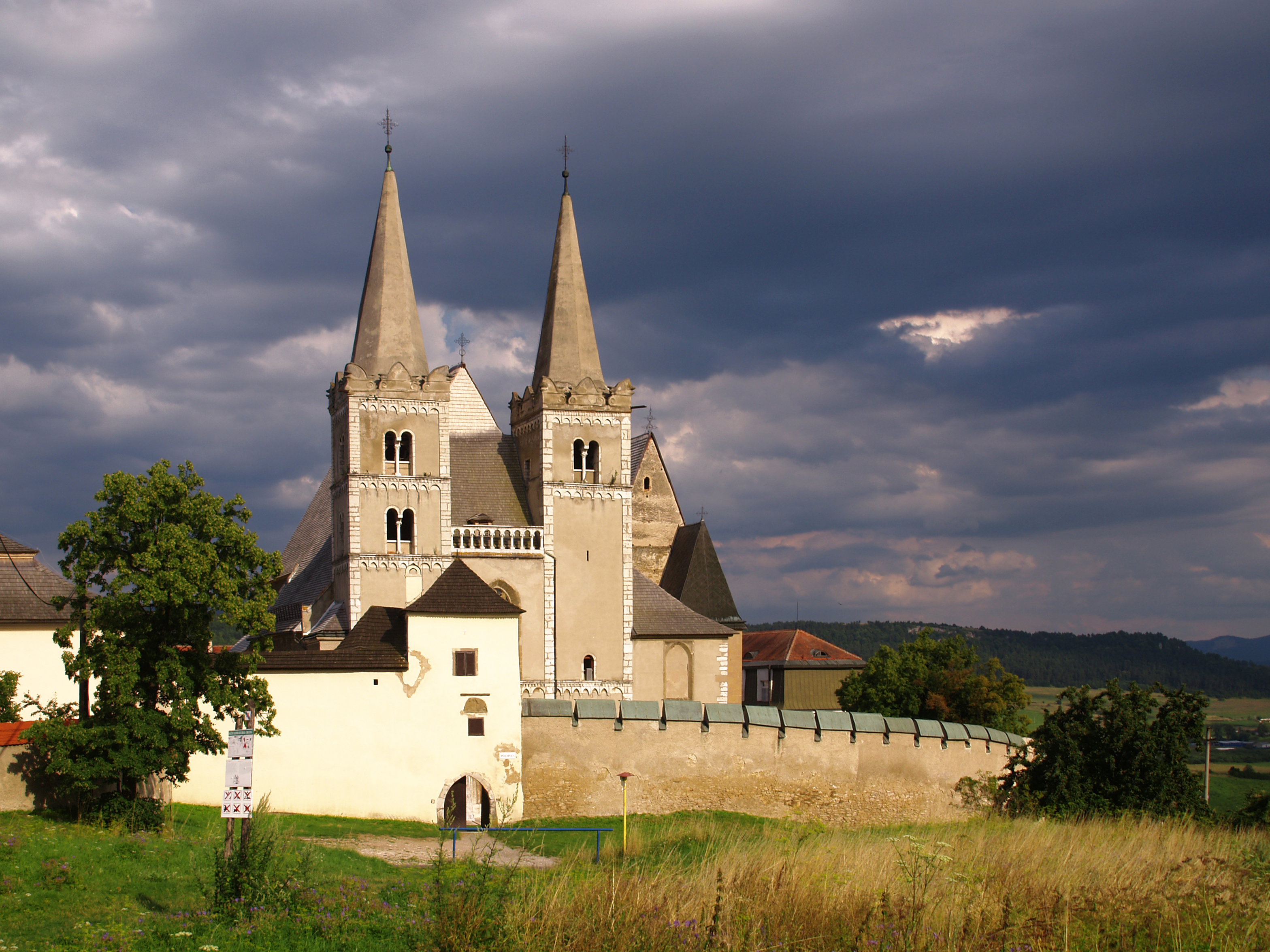 Spišská Kapitula - Entry to the strengthened ecclesiastical unit